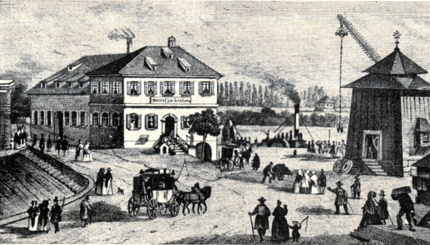 Der Krahnen. Verkehr am Heilbronner Kranen nach Einführung der Neckar-Dampfschifffahrt. In der Mitte der Gasthof zum Krahnen und die Anlegestelle der Dampfboote. Lithographie